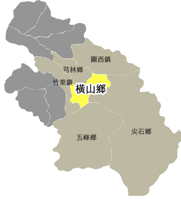 橫山鄉相對位置。